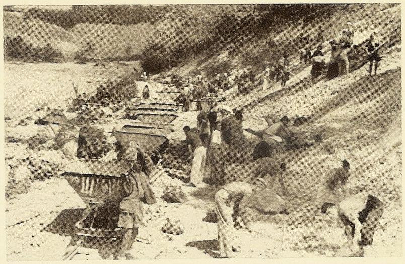 Postkarte mit dem Text „Omladinska pruge Šamac-Sarajevo – najljepši dar narodne omladine Jugoslavije svojoj otadžbini“ (Jugendbahn Šamac–Sarajevo – das schönste Geschenk der nationalen Jugend Jugoslawiens seine Heimat) auf der Rückseite.